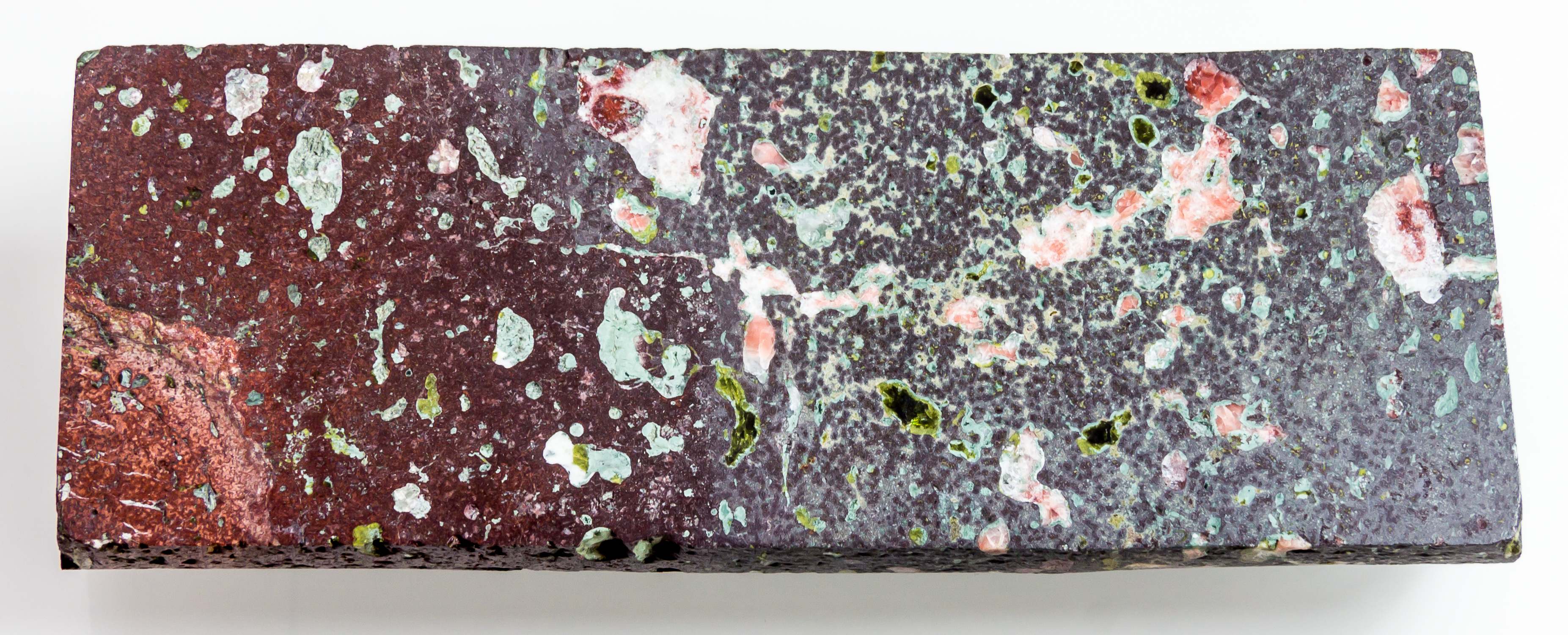 Ein geschnittener und polierter Bohrkern aus der Tiefbohrung Mirow 1/74, die mit einer Endteufe von 8008m die tiefste Bohrung in der DDR war. Das Gestein ist ein Rhyolith aus dem Unter-Rotliegenden.